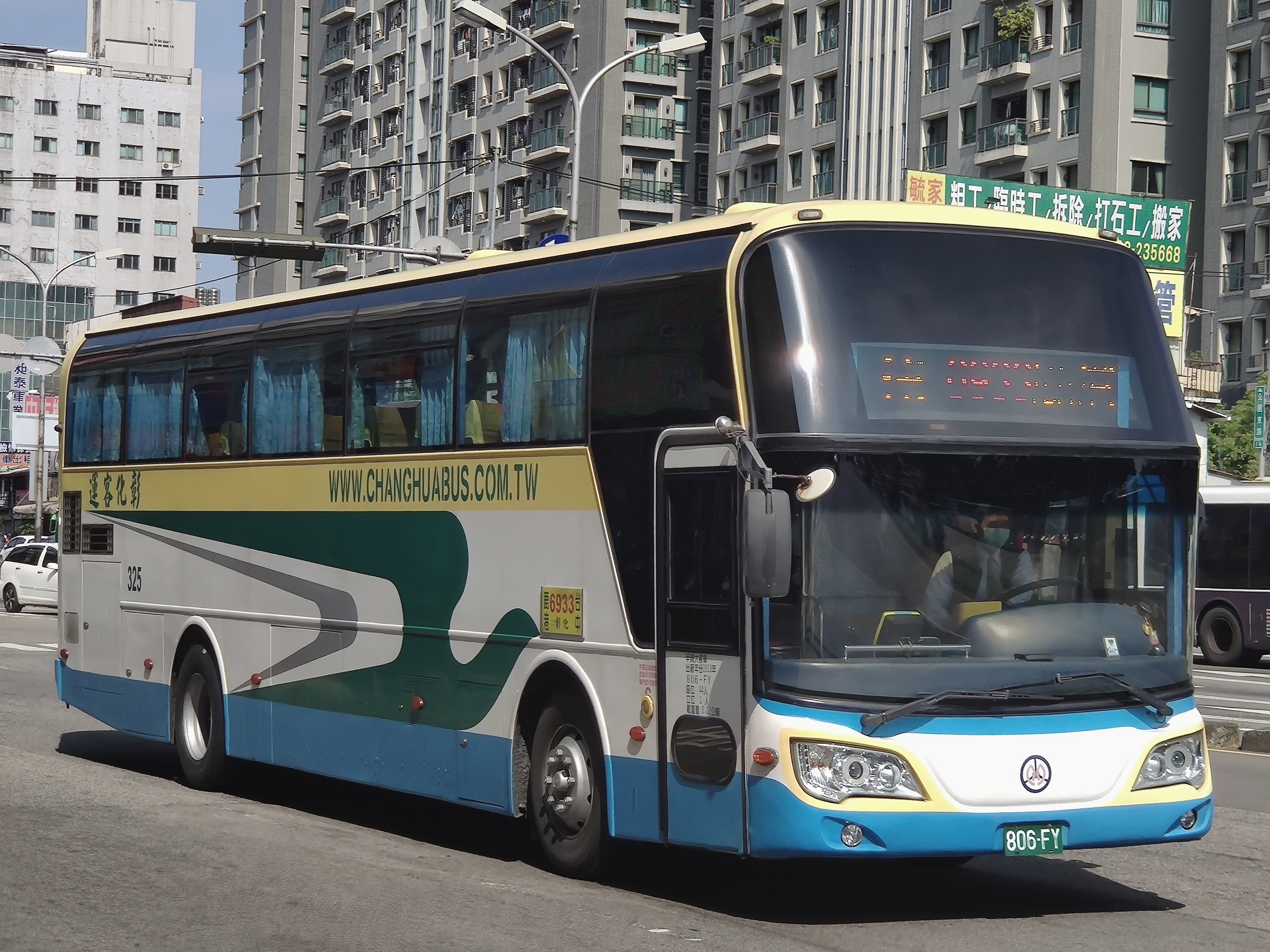 彰化客運 大宇BC211MA大客車 806-FY